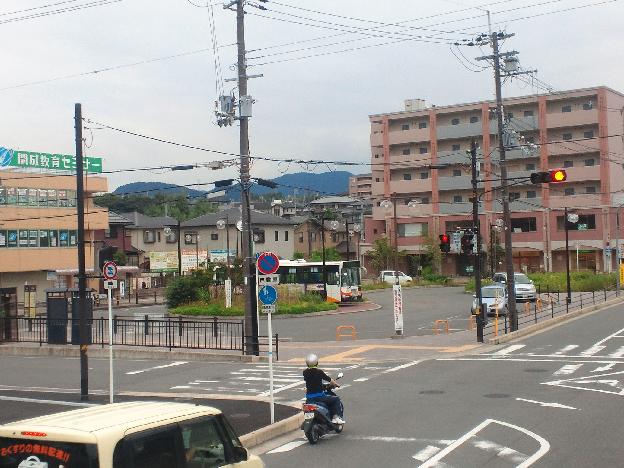 三日市町駅東バスターミナル